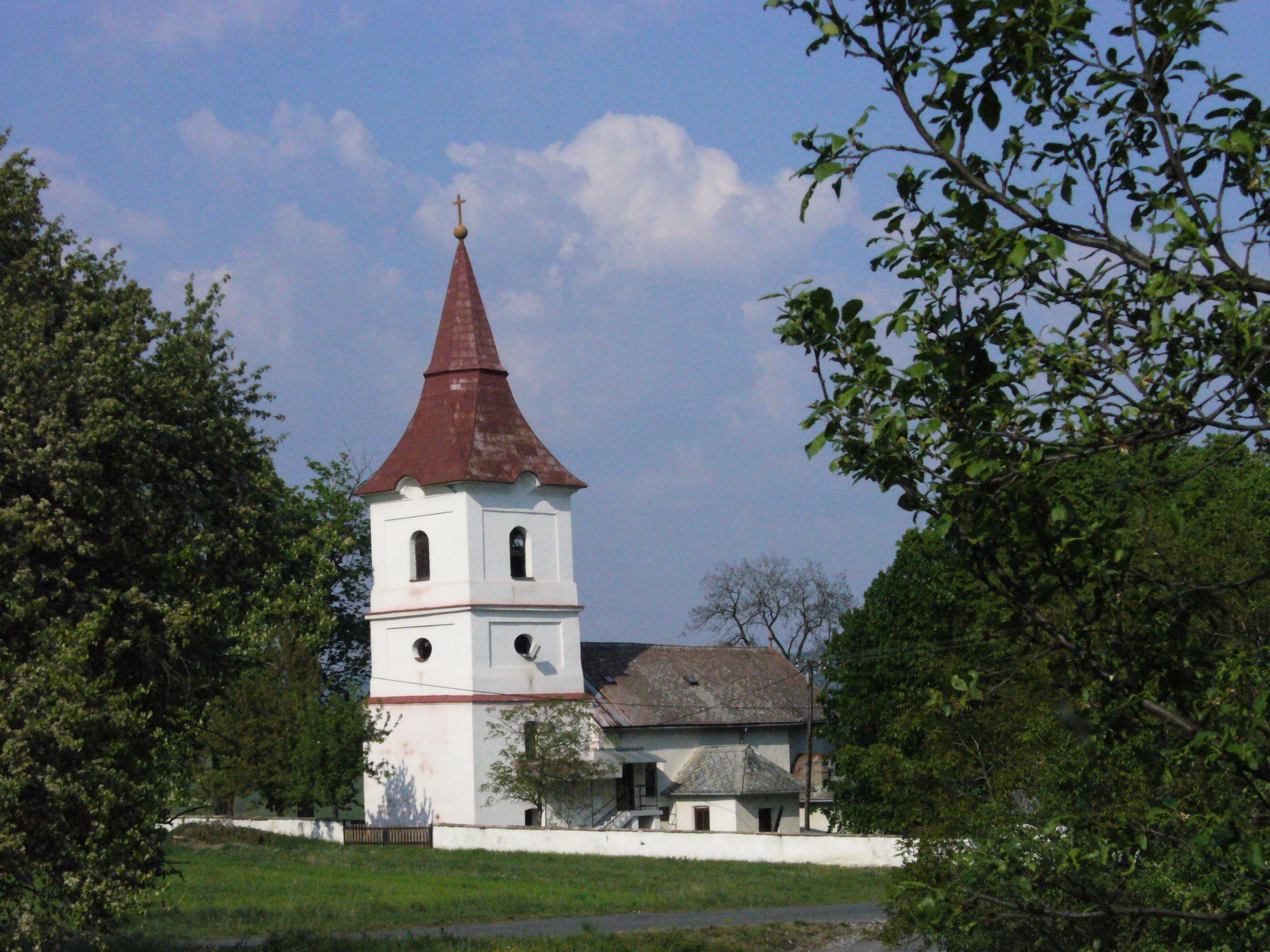 kostol v Príbelciach